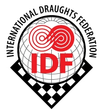 Логотип IDF